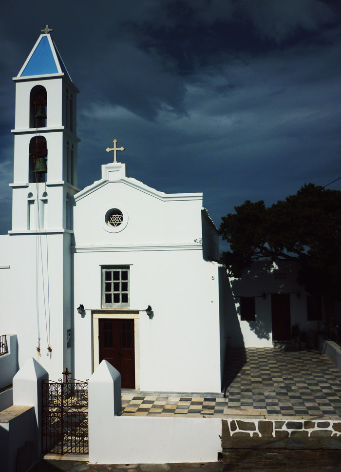 H ενορία του χωριού Bωλάξ, χτισμένη το 1816.